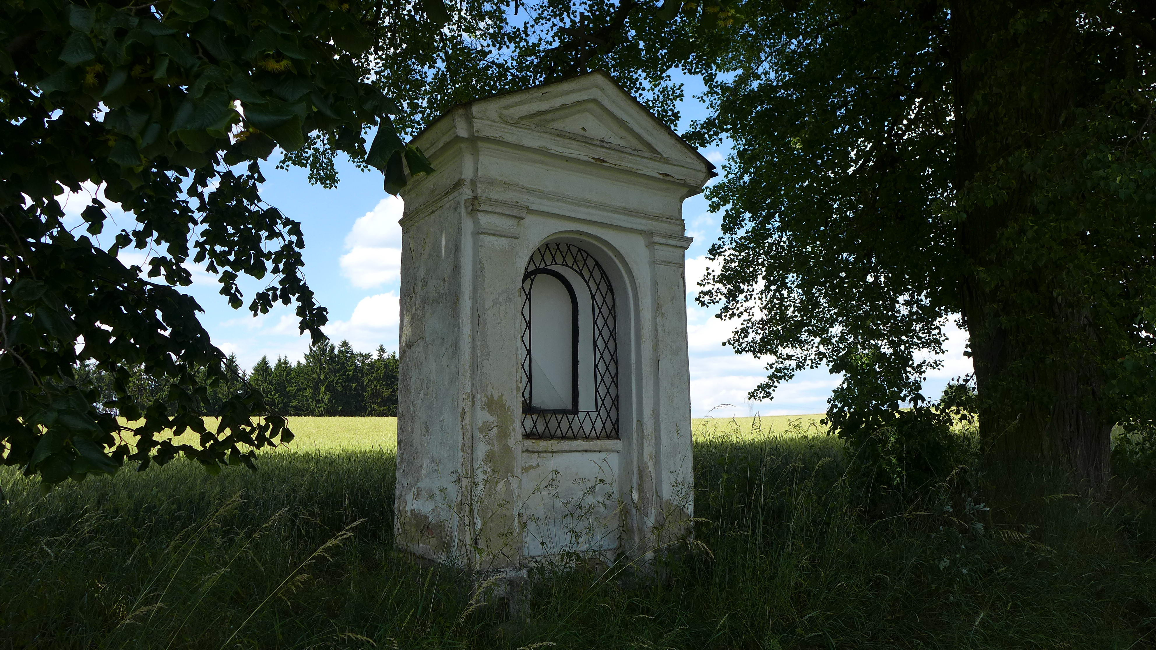 Výklenková kaplička - poklona (Rozseč), při silnici do Bohuslavic, Rozseč